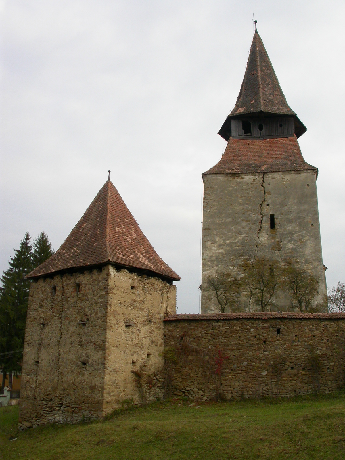 Ansamblul bisericii evanghelice fortificate, sec. XIV - XVII